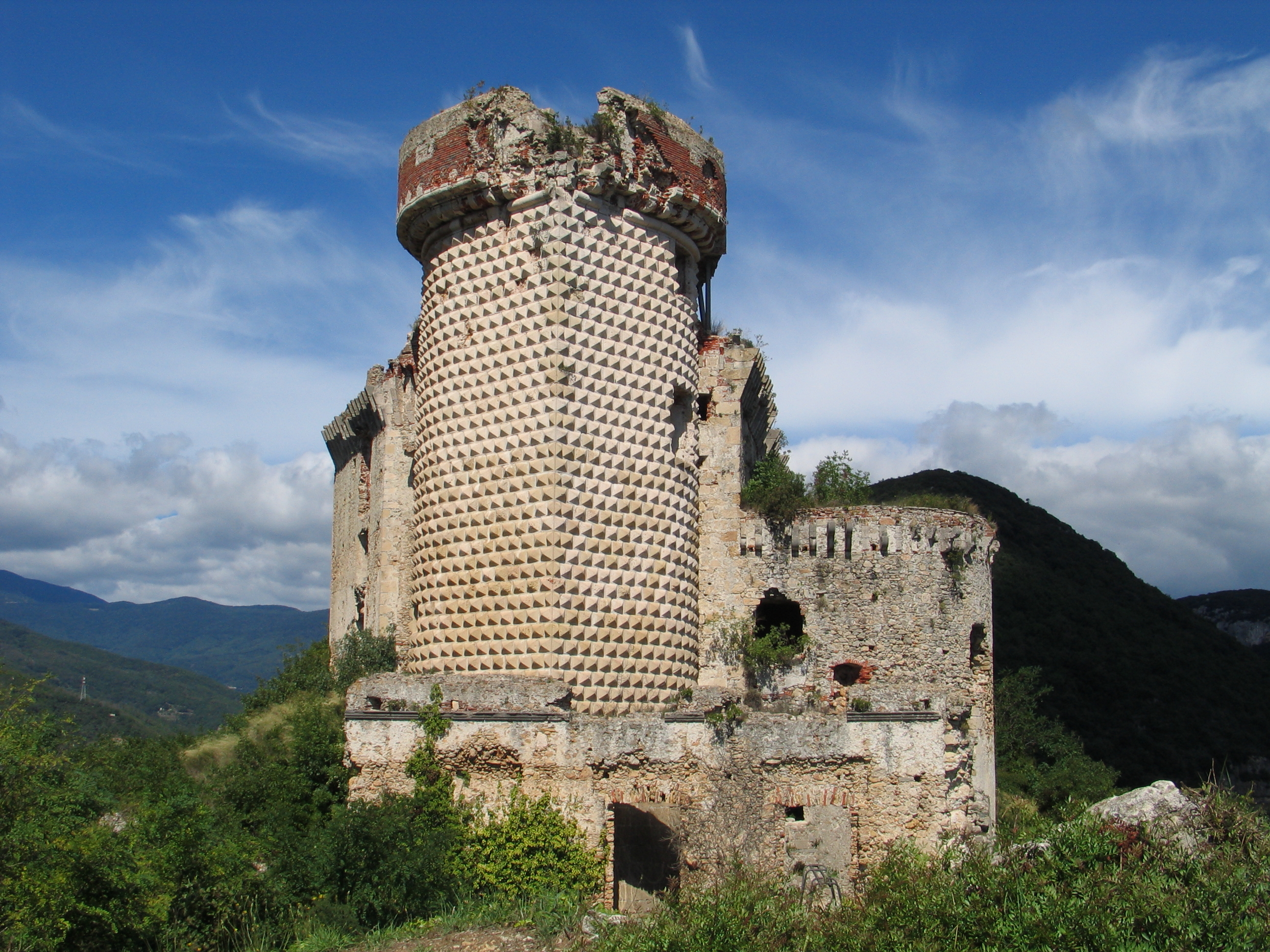 Ruine des Castel Gavone in Finale Ligure, Ligurien, Italien